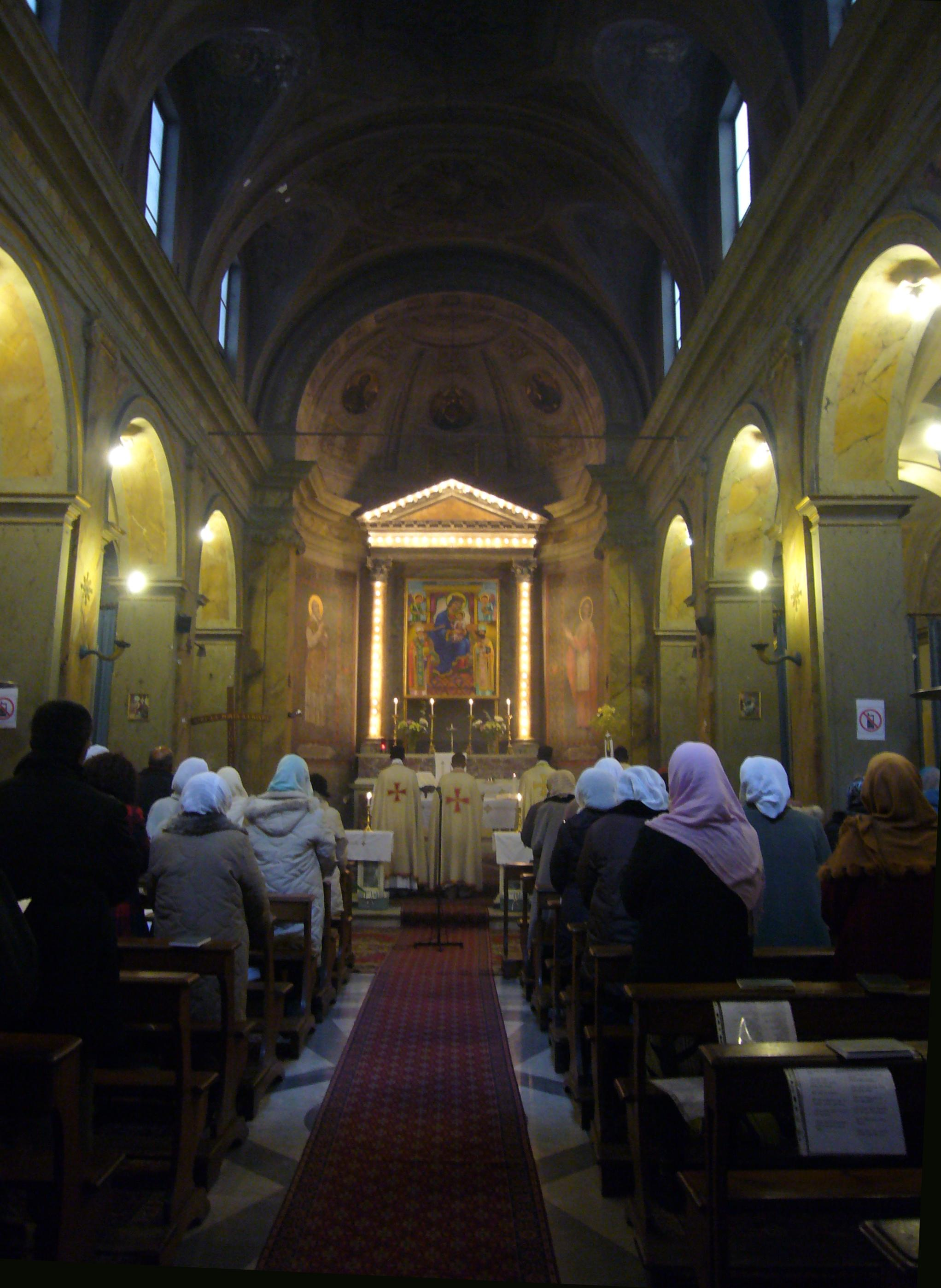 Roma, san Tommaso in Parione, interno. Messa della comunità etiopica